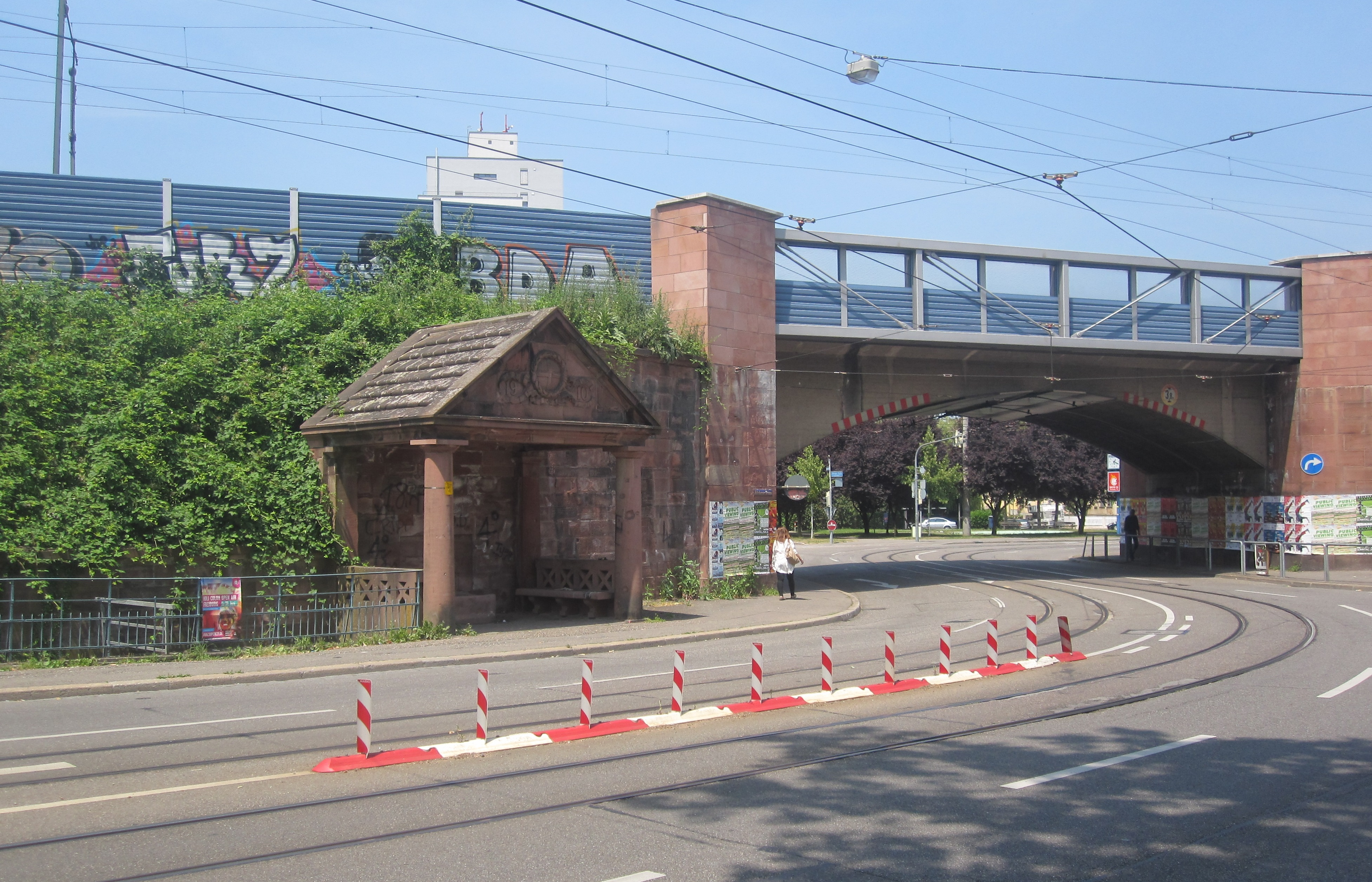 Unterführung Komturplatz mit altem Straßenbahn-Haltestellenhäuschen